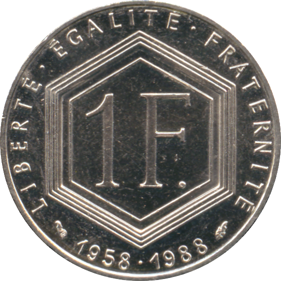 Avers de la pièce de 1 Franc français "Charles de Gaule, 5ième République" - 1988